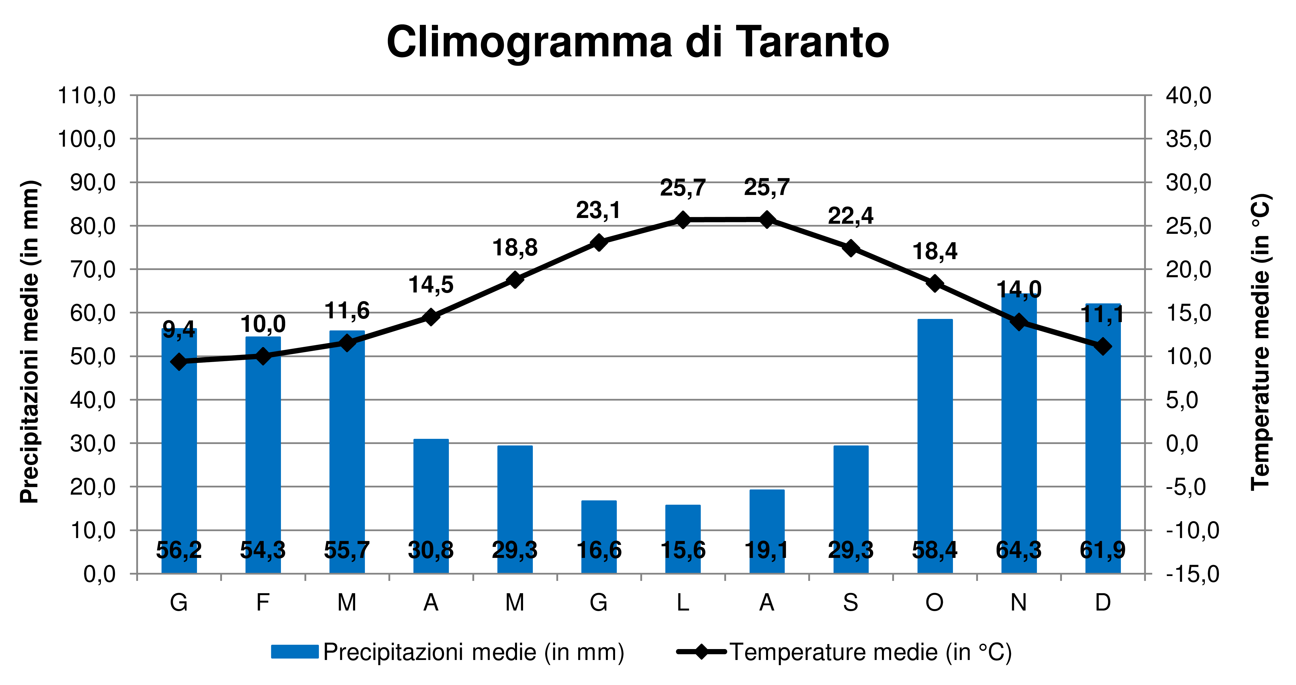 Climogramma di Taranto costruito dalla classe 1^ D della Scuola Secondaria di I grado "Francesco Severi" di Crispiano nell'anno scolastico 2015/2016 sulla base dei dati tratti dagli Annali Idrologici della Puglia (relativi agli anni dal 1952 al 1982).